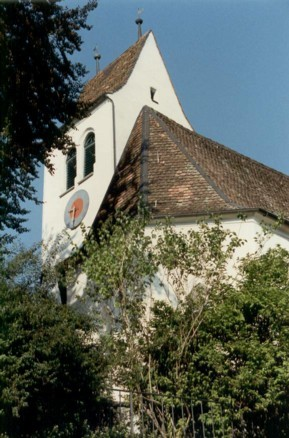 Der feste, sogenannt käsebissenförmige Kirchturm von Gretschins, Wartau, Kanton St. Gallen, Schweiz. - Foto: Jakob Vetsch, 1991.